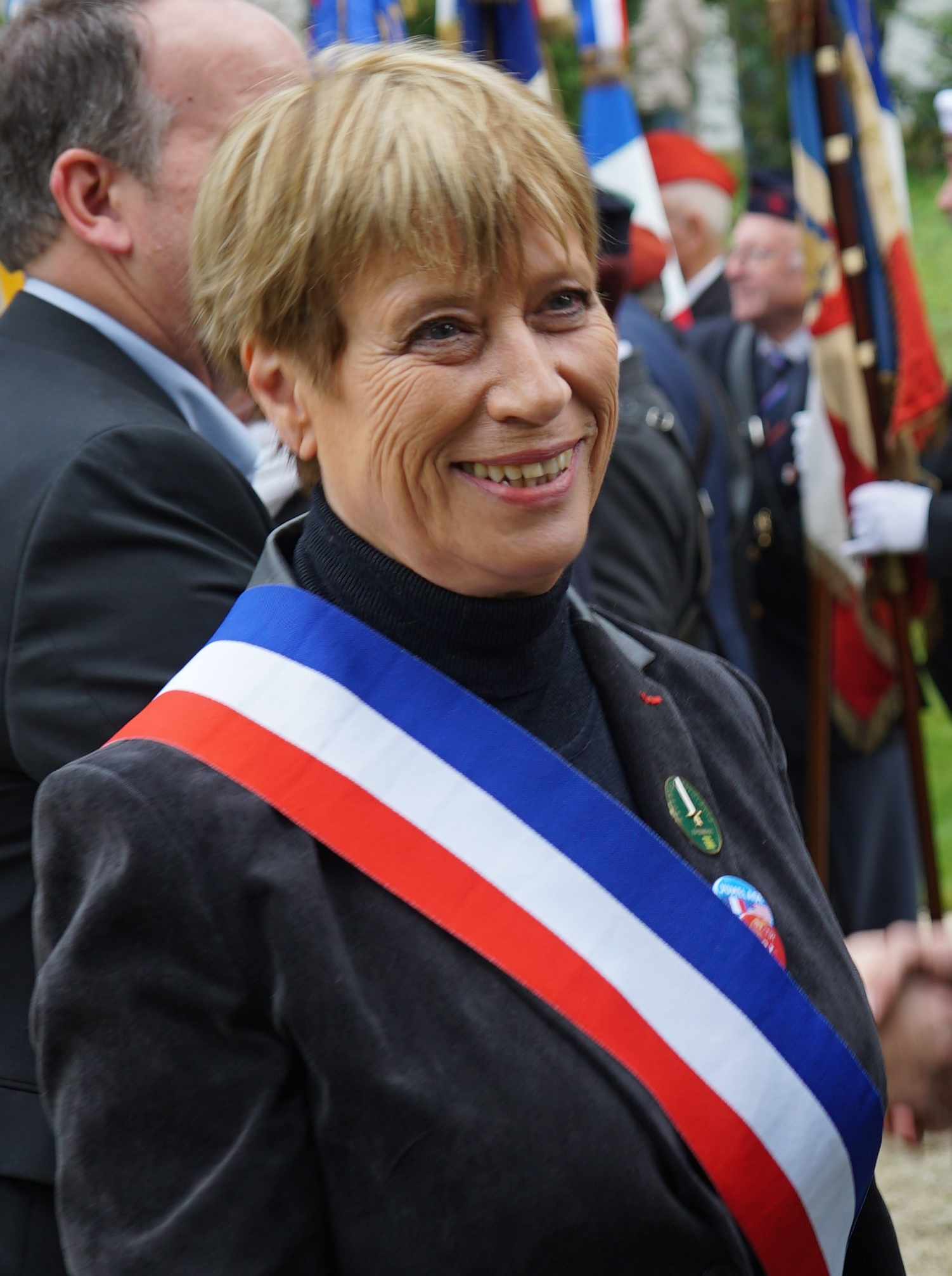 lors de la fête des drapeaux pour le centenaire.